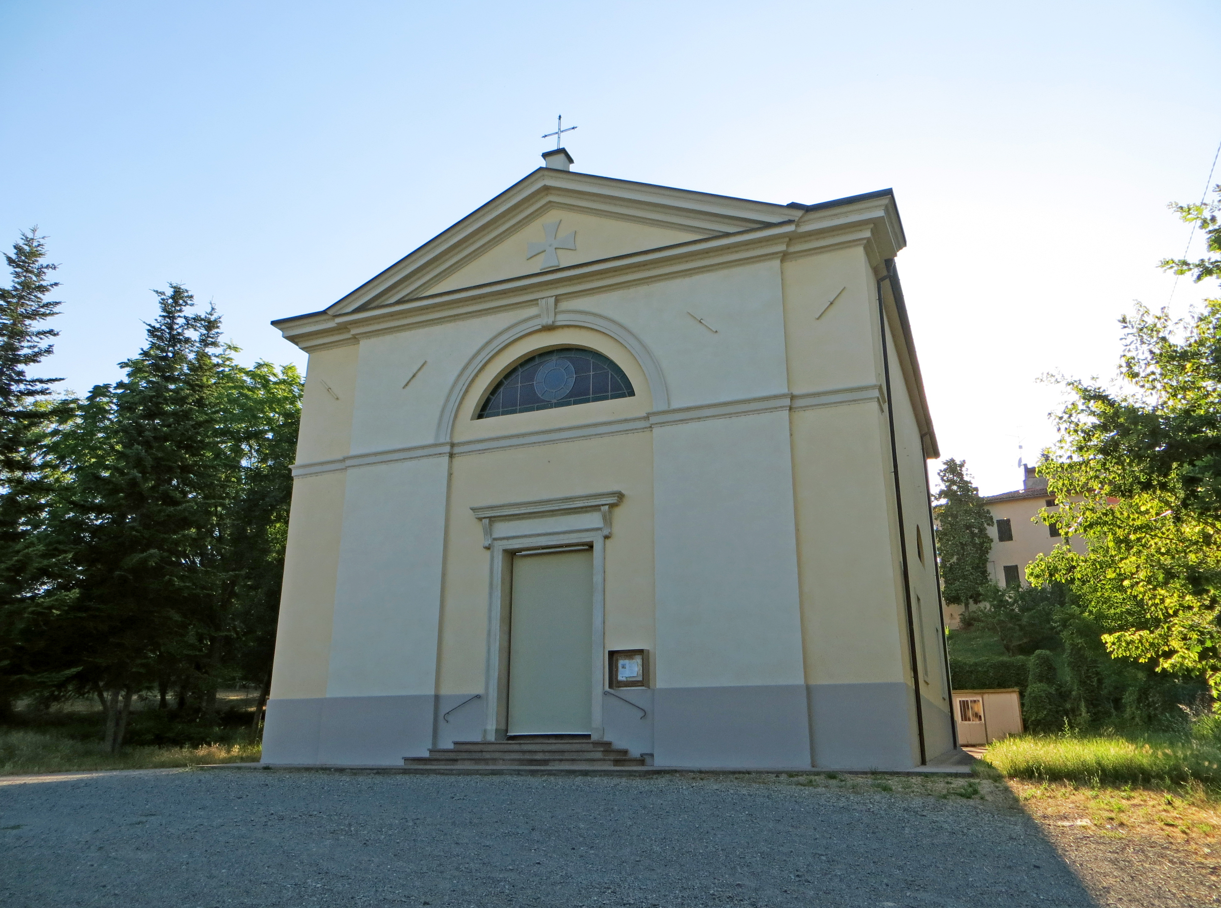 Chiesa di San Martino (Arola, Langhirano) - facciata